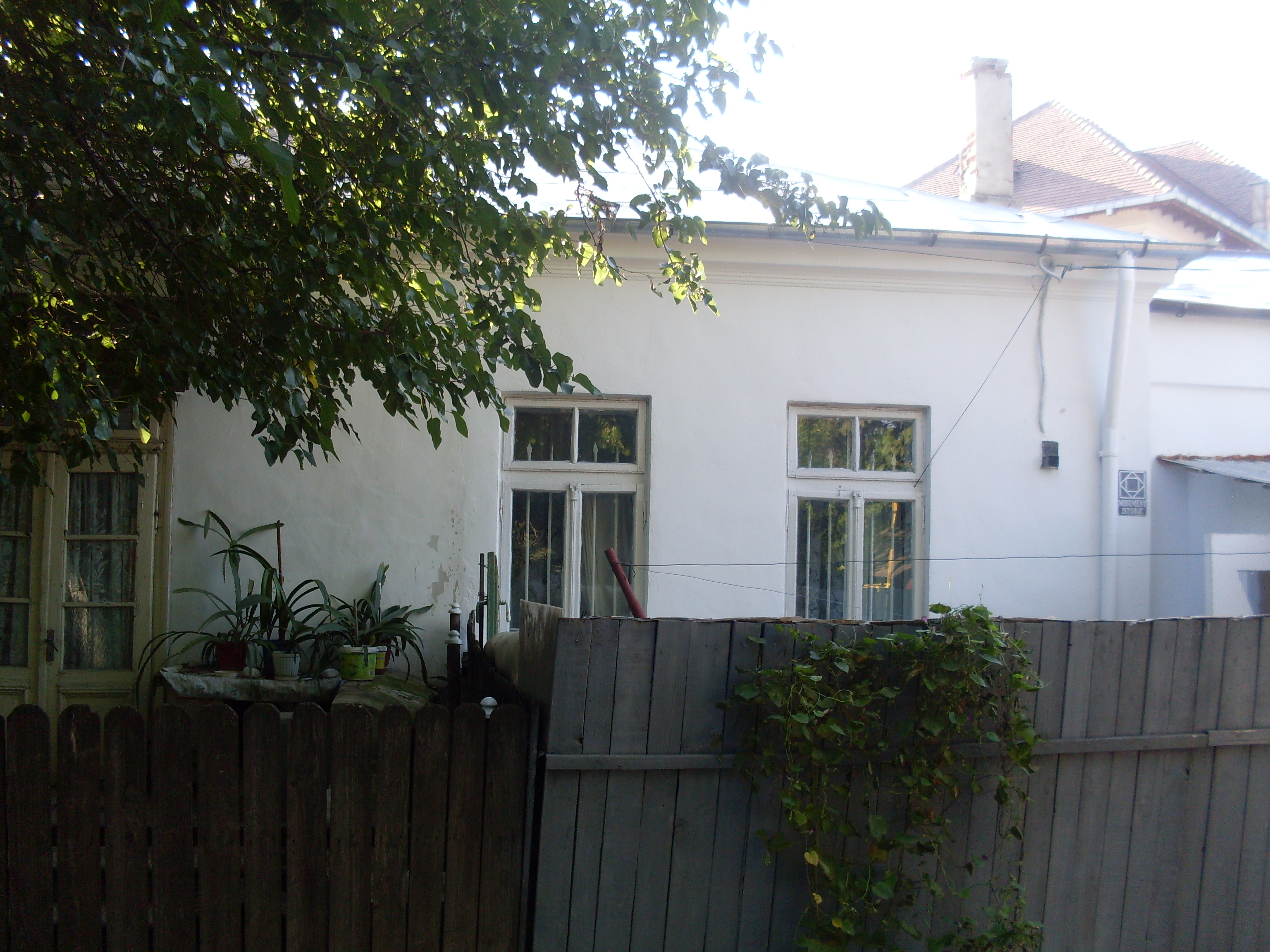 Casa Ioniță Hrisanti